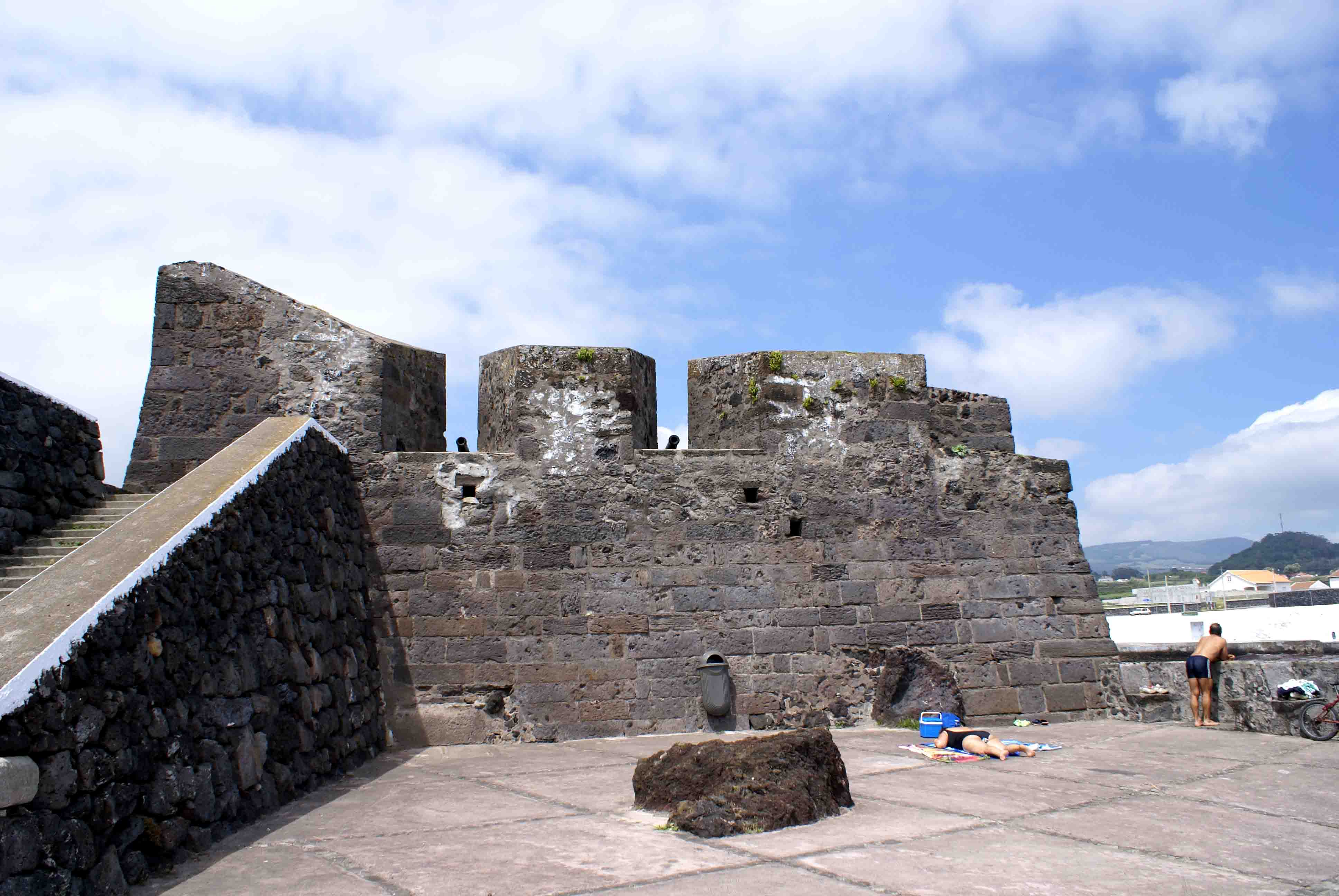 Forte do Negrito, muralha, São Mateus da Calheta, Angra do Heroísmo, ilha Terceira, Açores, Portugal.